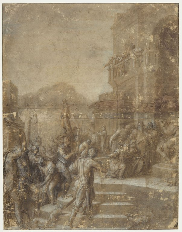 Andrea del sarto, disegno per il tributo a cesare, louvre.jpg